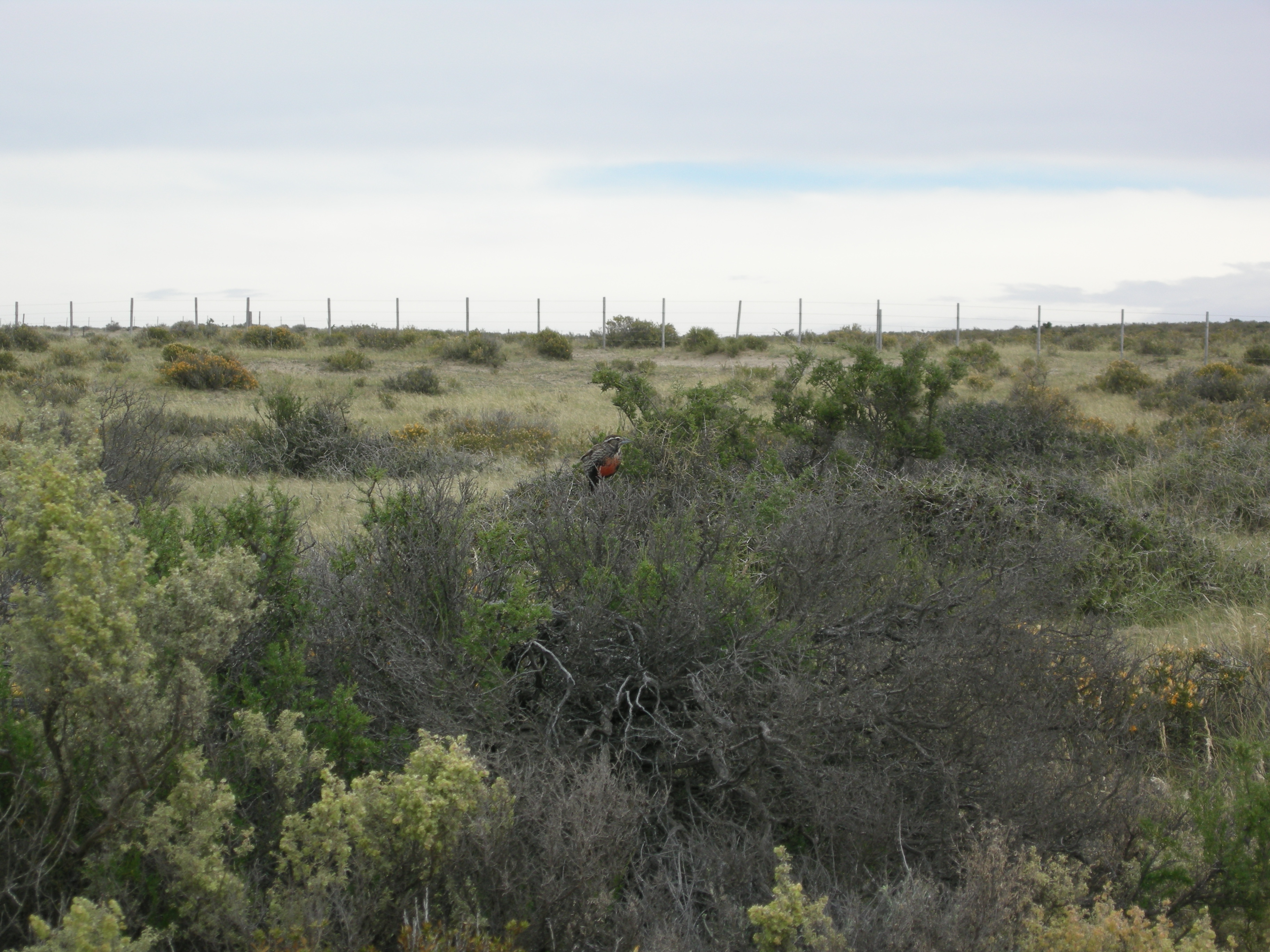 Sturnelle australe (Sturnella loyca) mâle photographié sur la péninsule Valdès (province de Chubut, Argentine).